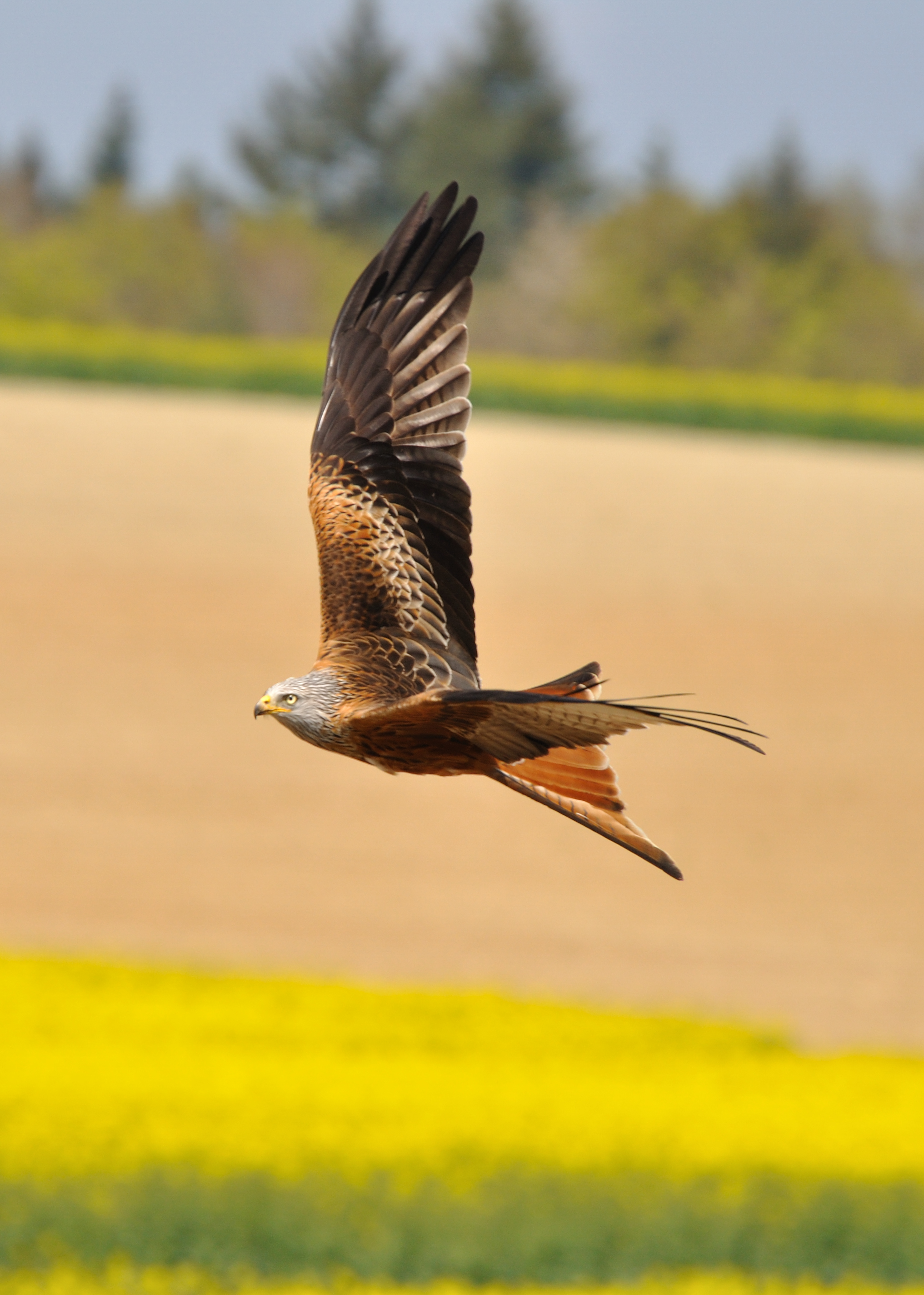 Switzerland, Canton of Schaffhausen, red kite in flight near Gennersbrunn